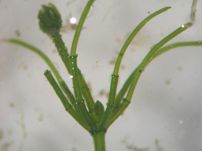 Gewöhnliche Armleuchteralge Chara vulgaris, Müritz-Gebiet